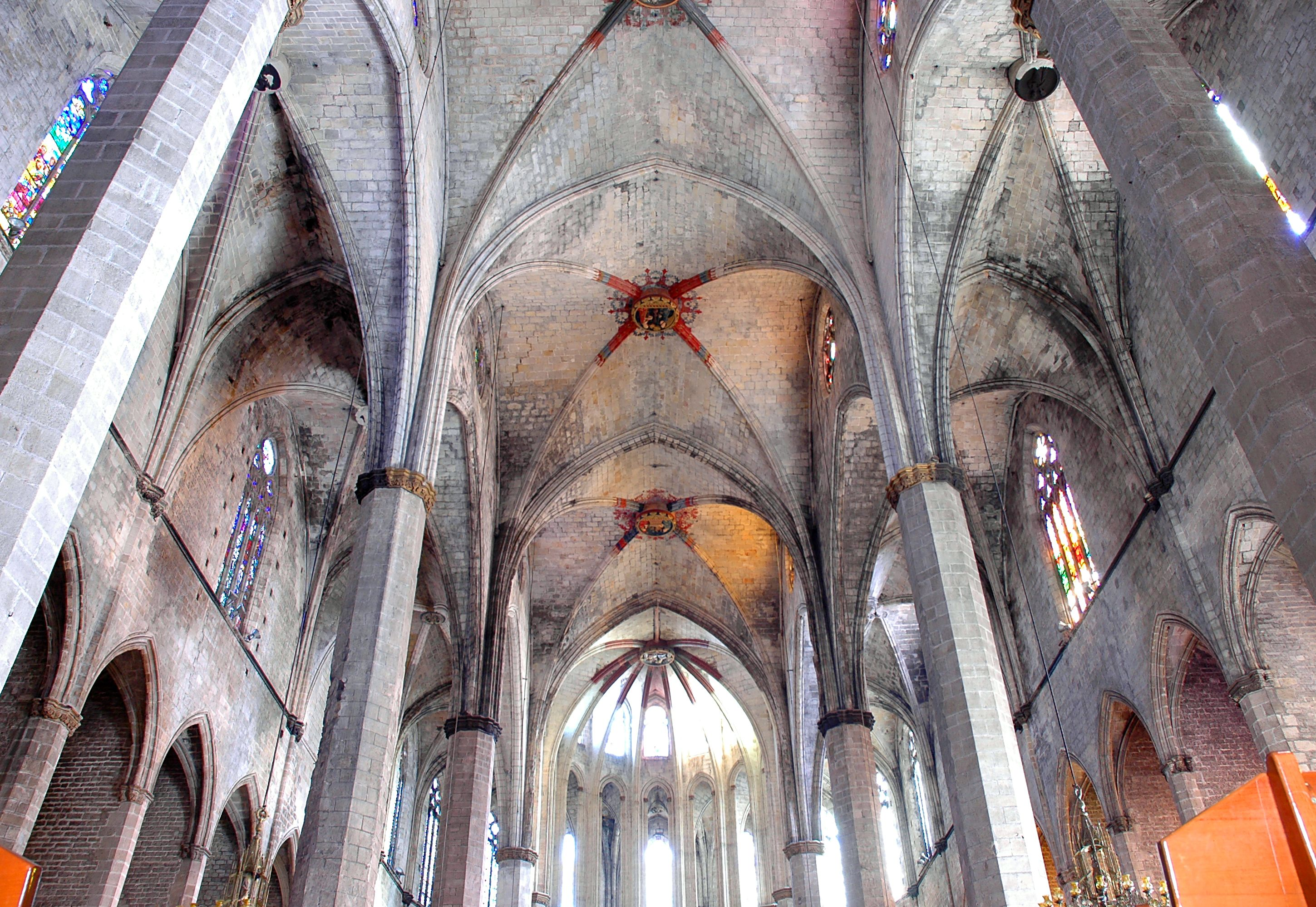 Santa Maria del Mar - Nau interior